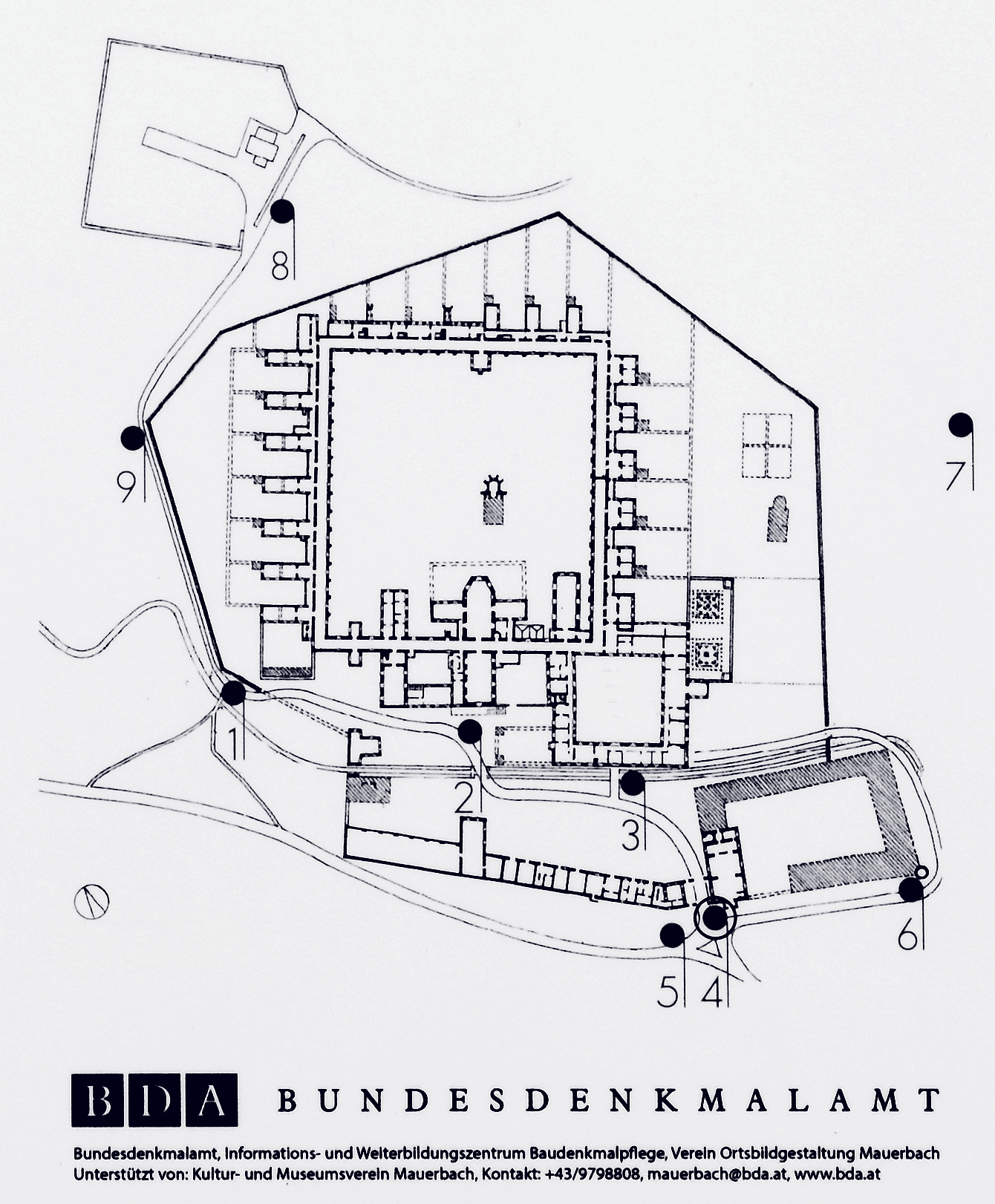 Übersichtsplan der ehemaligen Kartause (1782 aufgelöst) in der niederösterreichischen Marktgemeinde Mauerbach. Der Übersichtsplan ist ein Teilausschnitt einer vor dem Hauptportal öffentlich aufgestellten Infotafel. Die schraffierten Flächen sind abgegangene Gebäude(teile) und die Nummern markieren Stationen eines Themenweges.